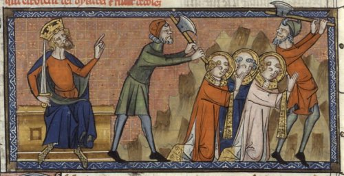 The martyrdom of Saint (Pope) Sixtus II and his deacons. Martyre de saint Sixte II et de ses diacres. Cote: Français 185 , Fol. 96v . Vies de saints, France, Paris